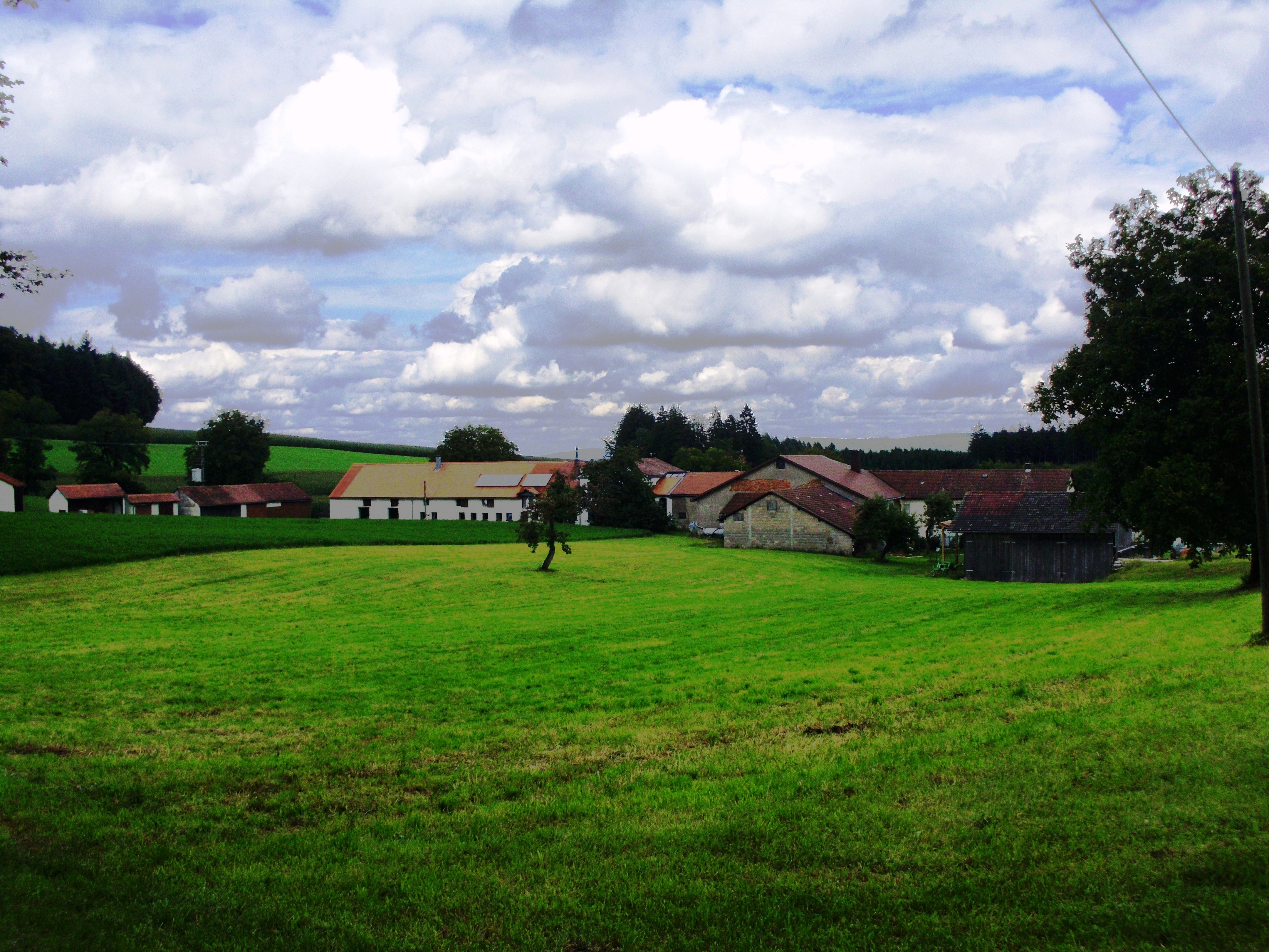 Freihardt, Ortsteil von Treuchtlingen im Landkreis Weißenburg-Gunzenhausen